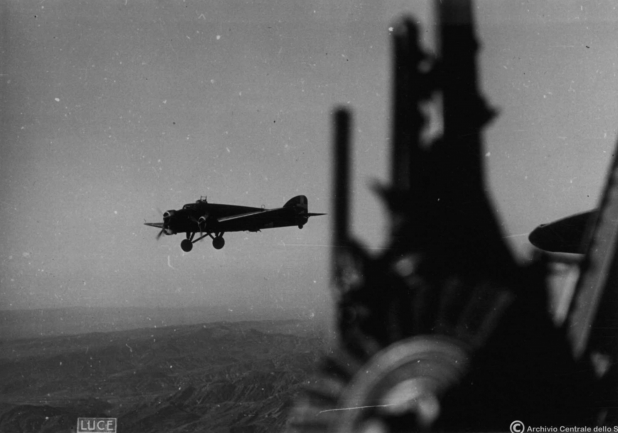 SM.81 Pipistrello in formazione